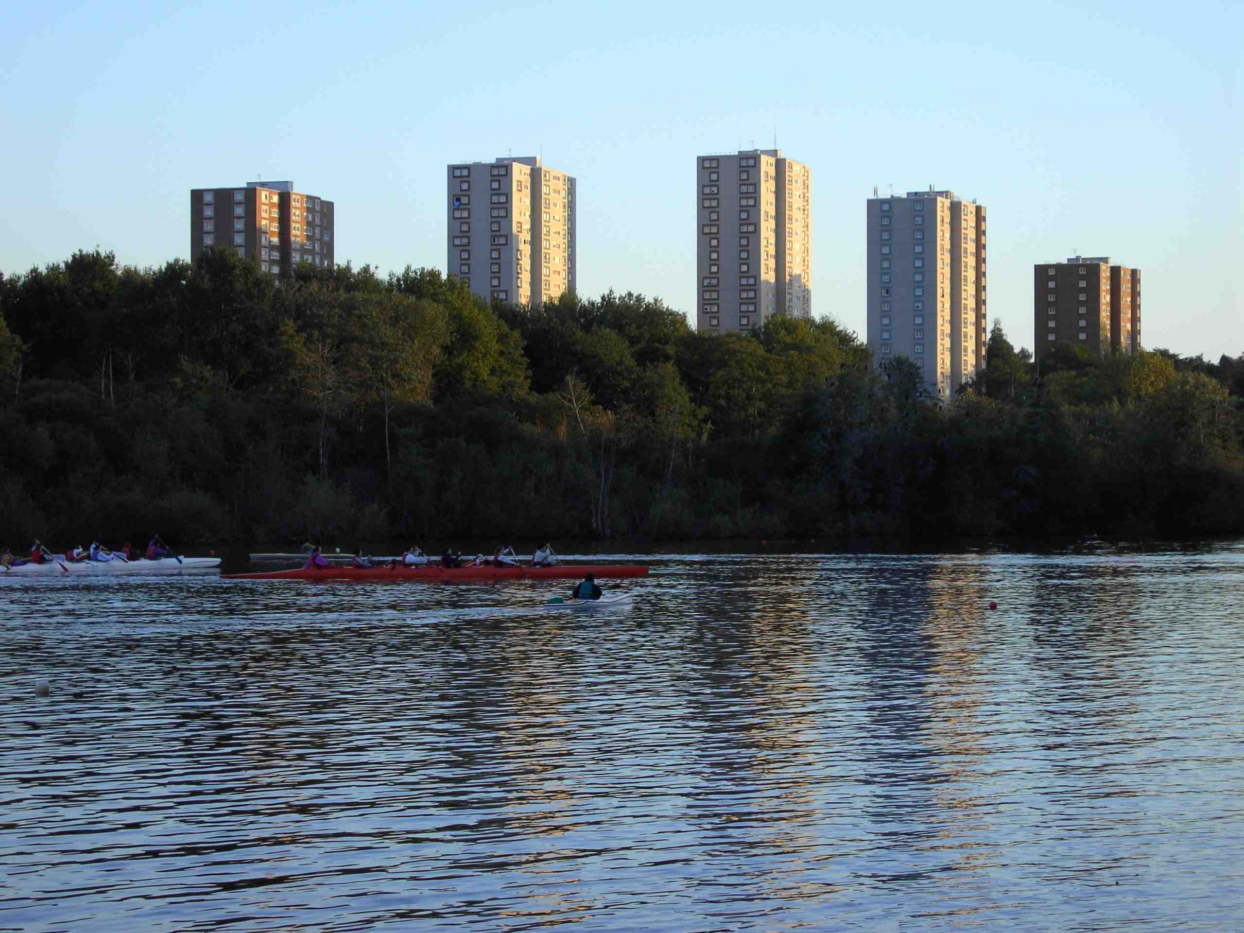 Nantes, Fluss Erdre. Fotograf: Bernd Reichelt. Aufnahme: Oktober 2005.